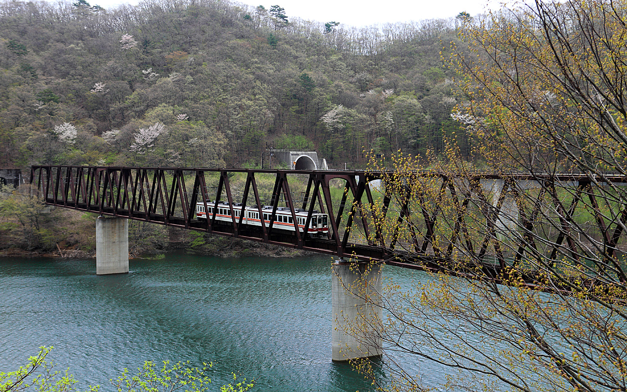 Yagan Railway Yunishigawa Bridge.